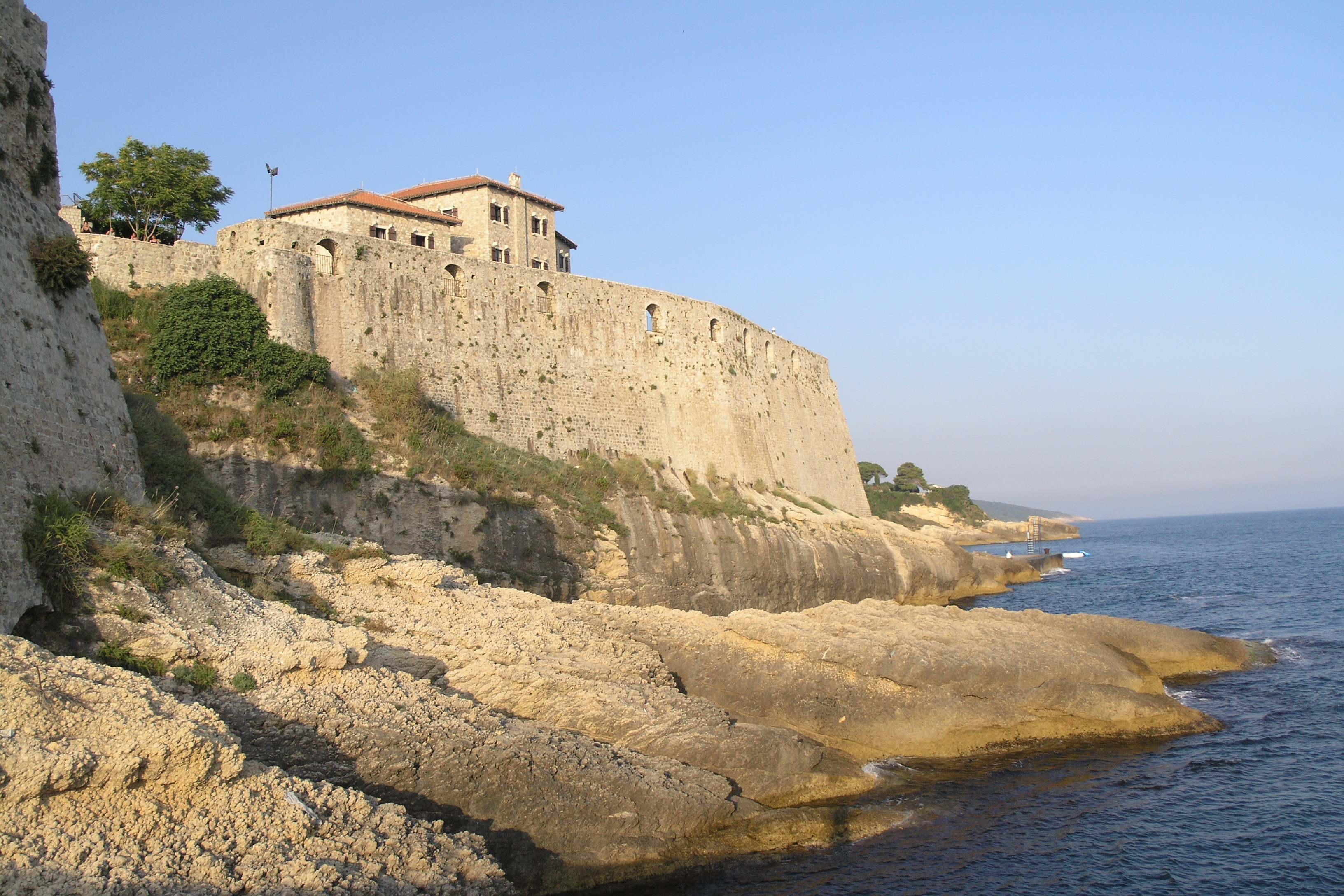 Černá Hora, Ulcinj - hradby starého města